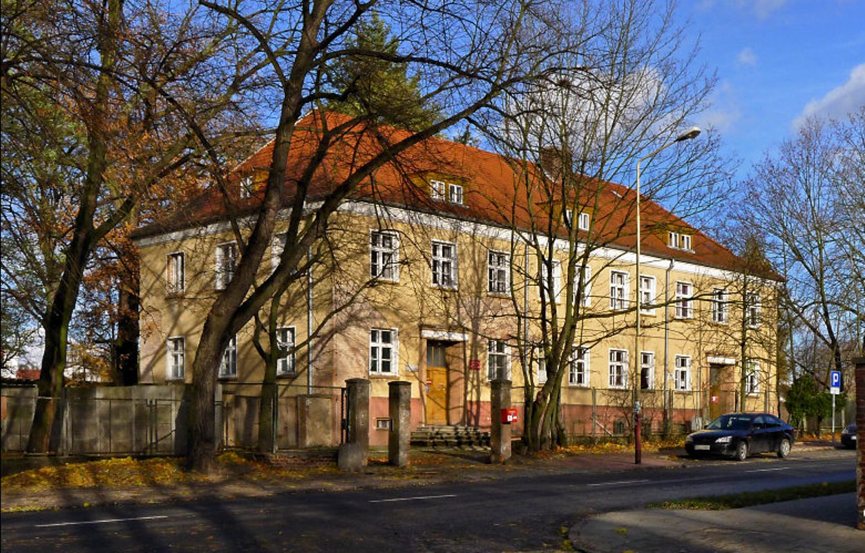 Oddział okulistyki i laryngologii przy ulicy 11-go Listopada został przeniesiony do głównego obiektu przy ulicy Wojska Polskiego 27